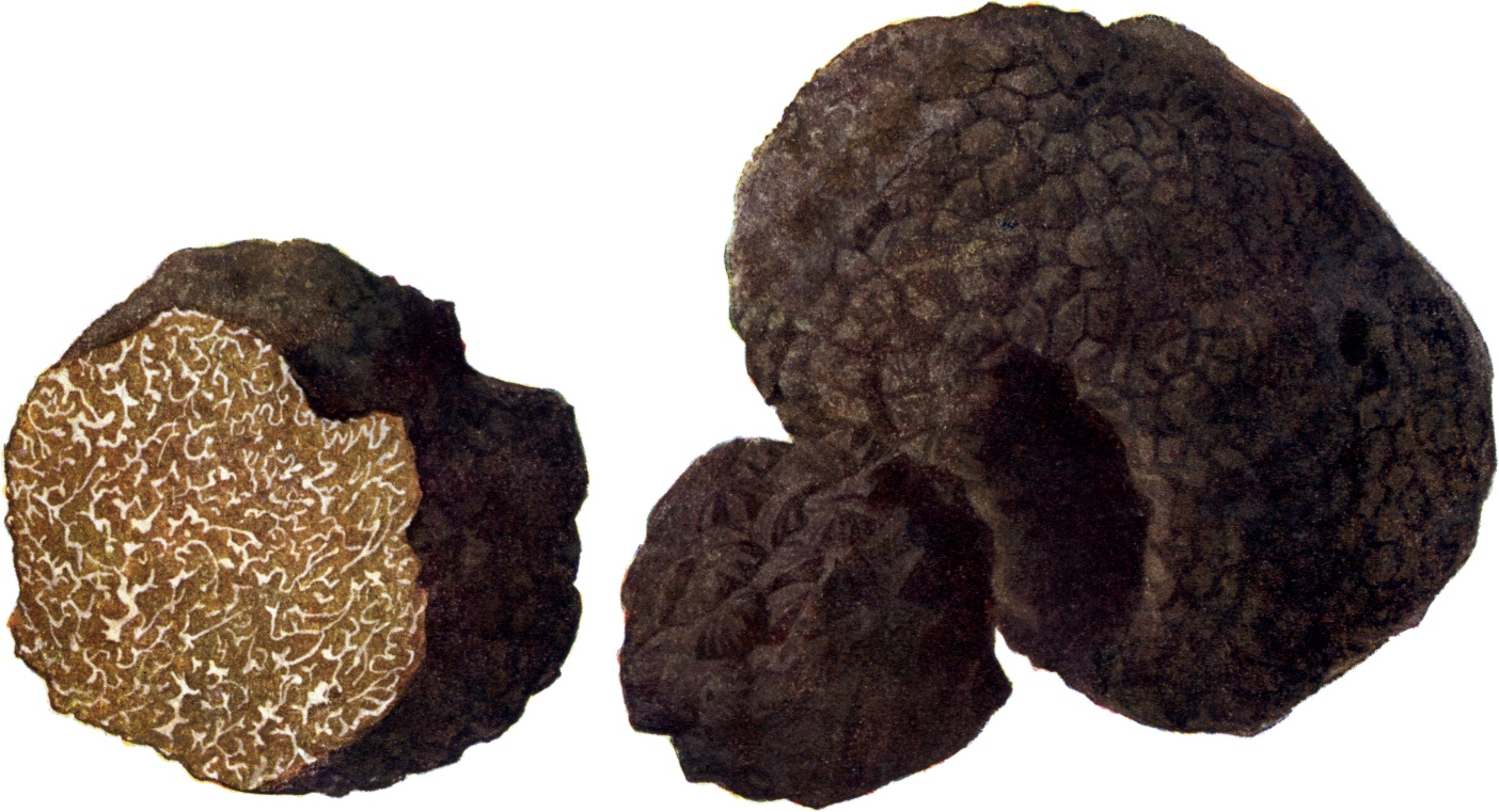 Sommer-Trüffel, Tuber aestivum. Eßbar.